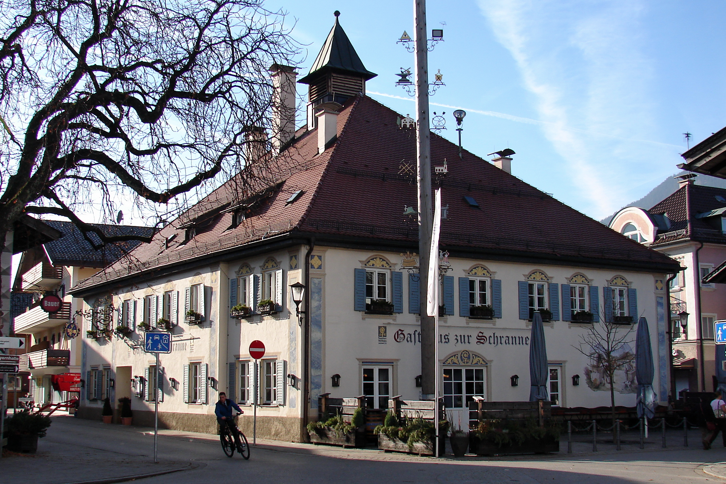 Gasthaus zur Schranne im Markt Garmisch-Partenkirchen